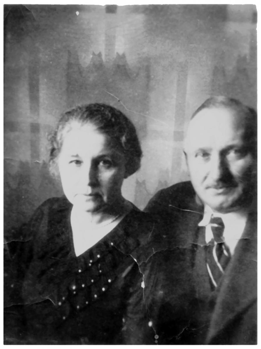 Ольга з Павлюхів та Володимир Гузарі